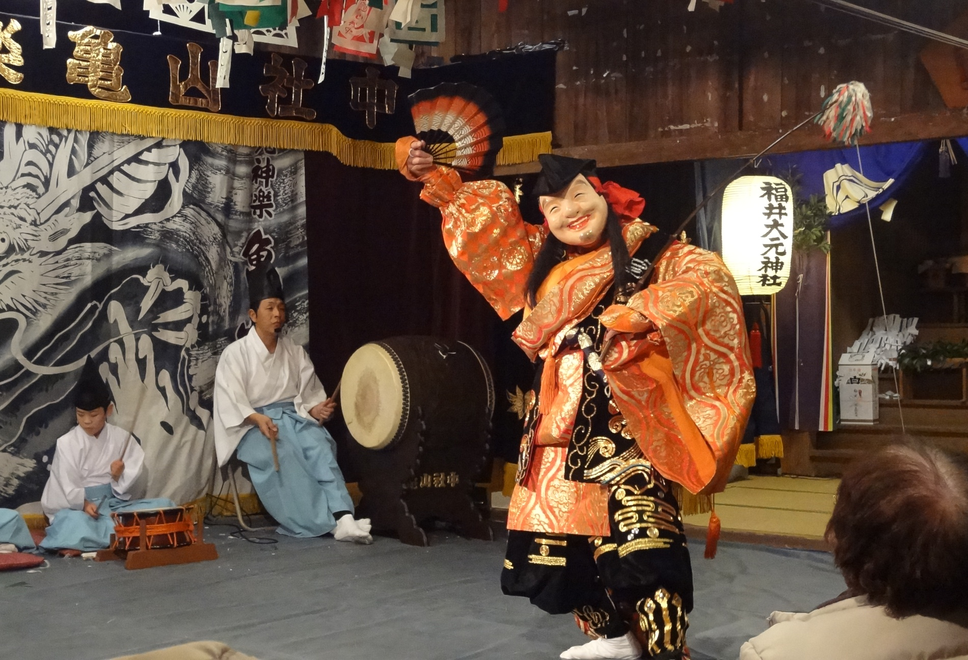 石見神楽・演目は恵比須。石見神楽亀山社中（島根県浜田市）。事代主が鯛釣りする様を舞う演目。